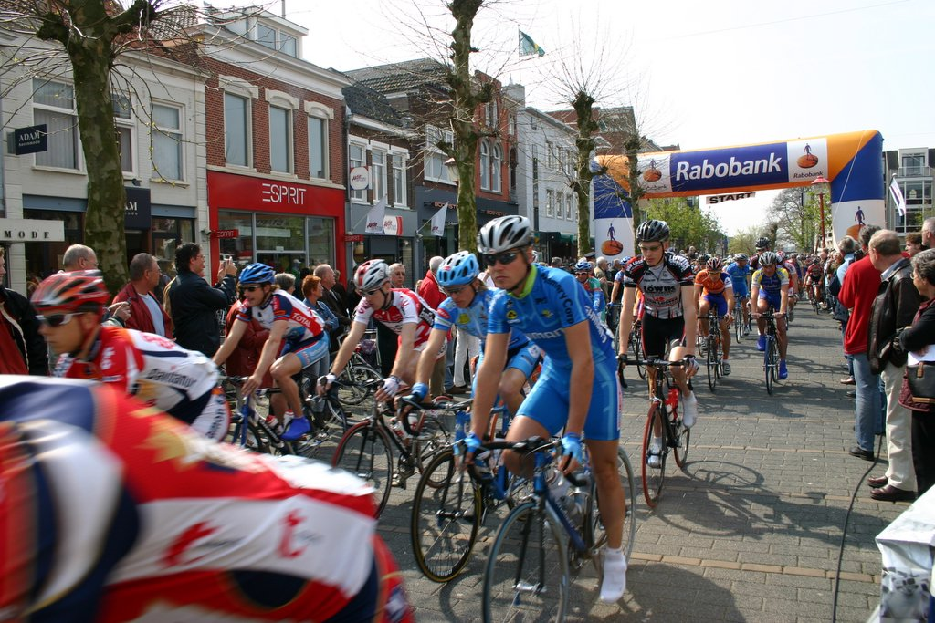 Start van de Veenendaal-Veenendaal wielertocht op 15 april 2005. Start vanaf de Markt.